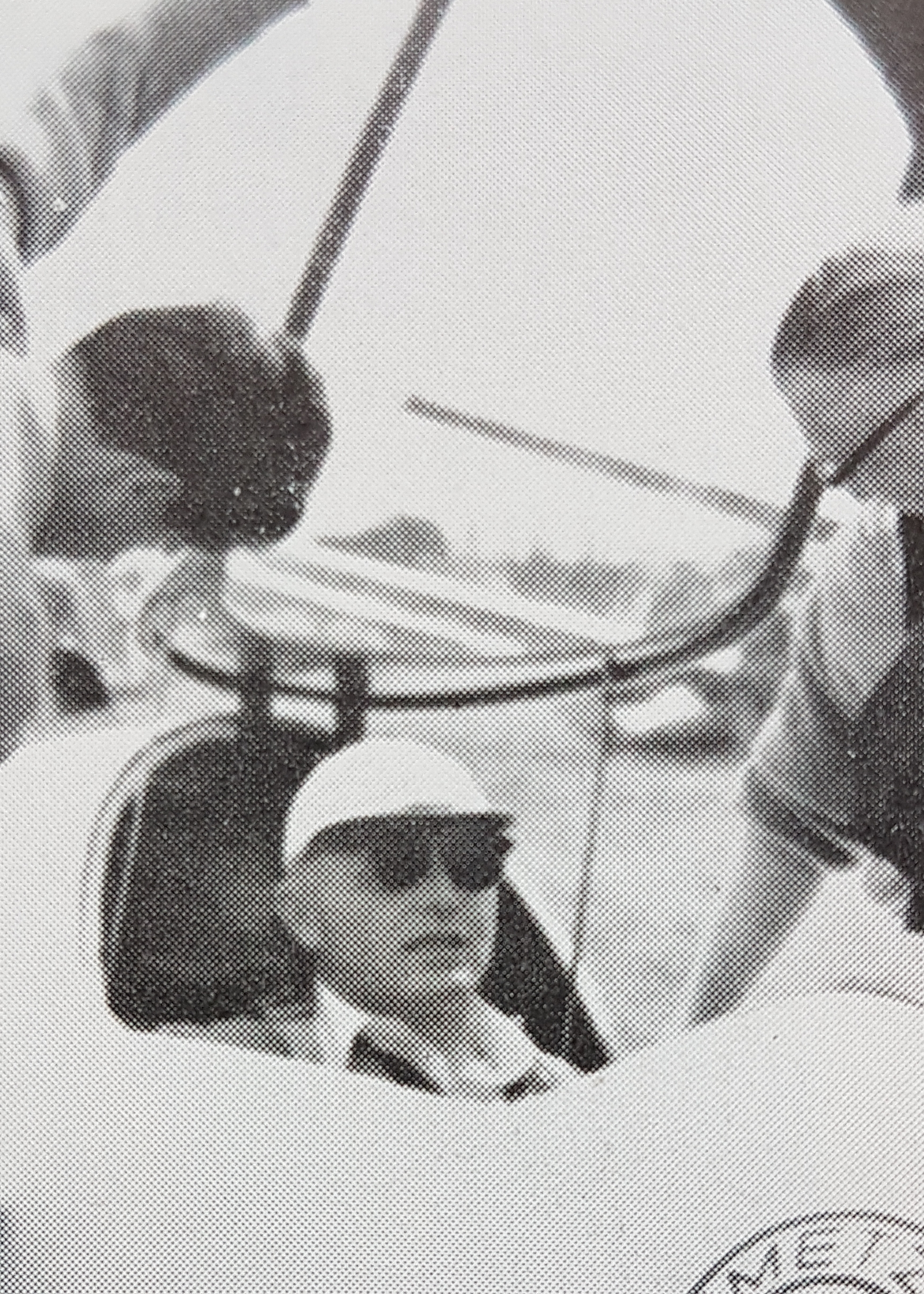 Ernst G. Haase (Ernst Günter Haase)